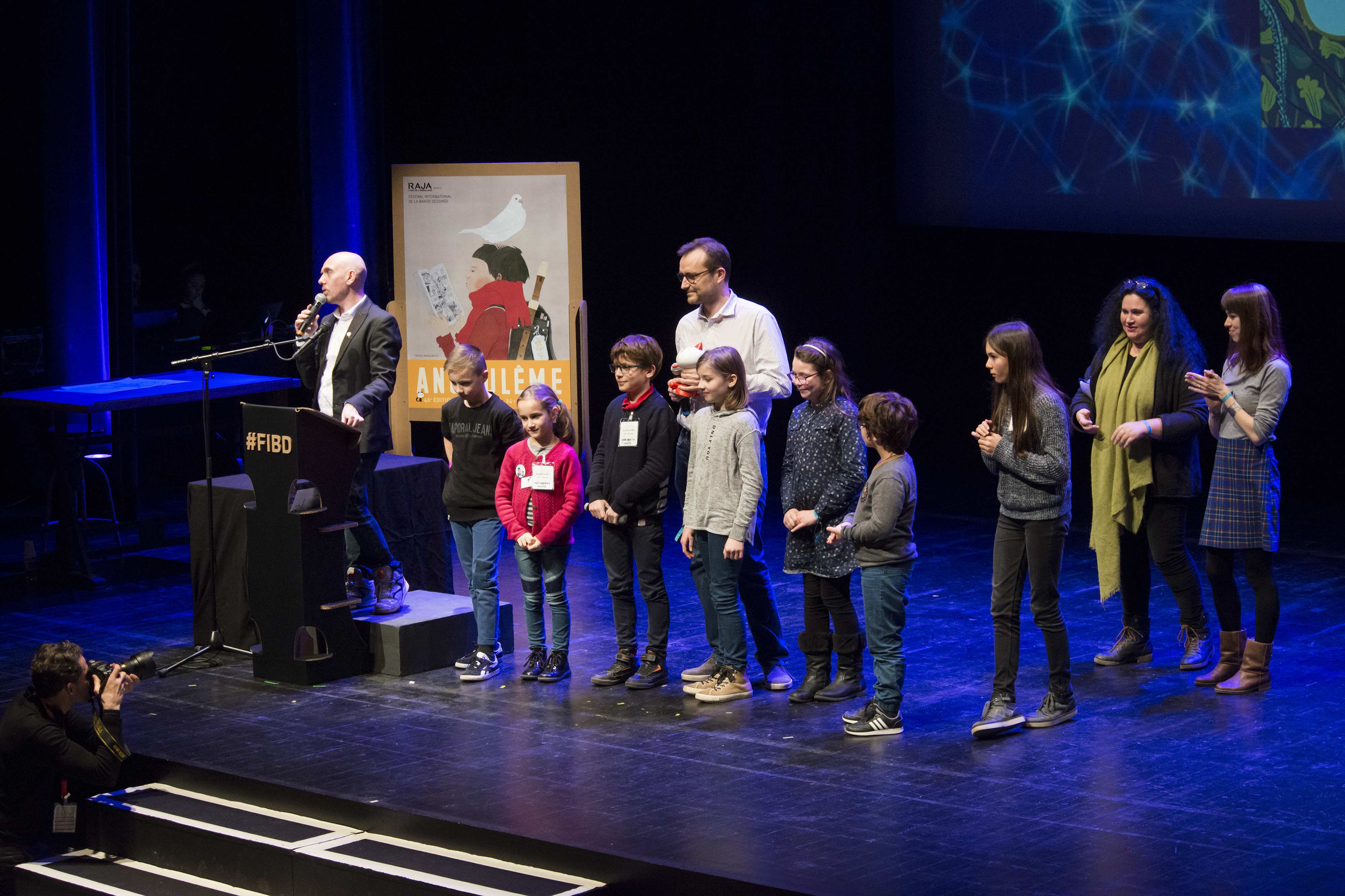 L'éditeur français de l'album Le Prince et la Couturière de Jen Wang, lauréat du Fauve Jeunesse à la cérémonie des prix Découvertes du Festival BD d'Angoulême 2019.